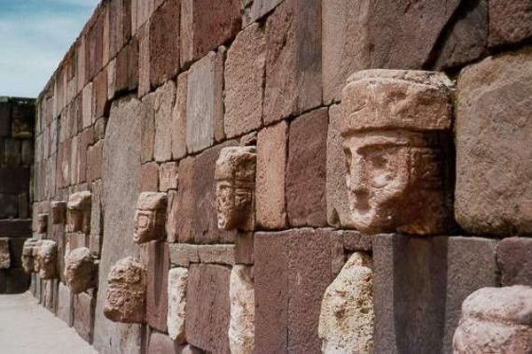 جدار